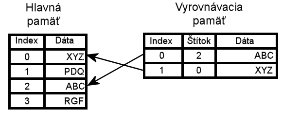 Diagram opisujúci prácu vyrovnávajúcej pamäte. Kategória:Obrázky schém